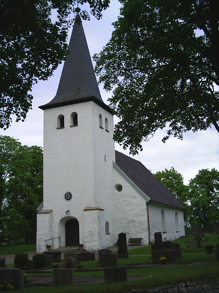 Upphärads församlings kyrka. Fotograf: Tubaist 6 juni 2005 kl.23.54 Tubaist 768x1024 (385921 bytes) ( Upphärads församlings kyrka. Fotograf: ~~~~ GFDL )